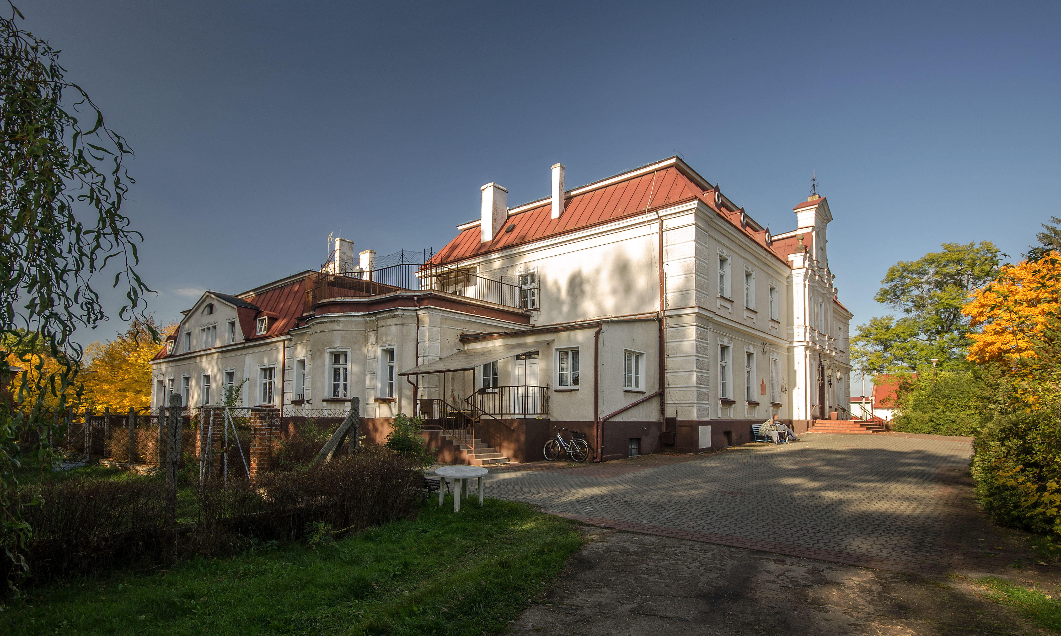 Gierałcice, oficyna, ob. Caritas, pocz. XIX